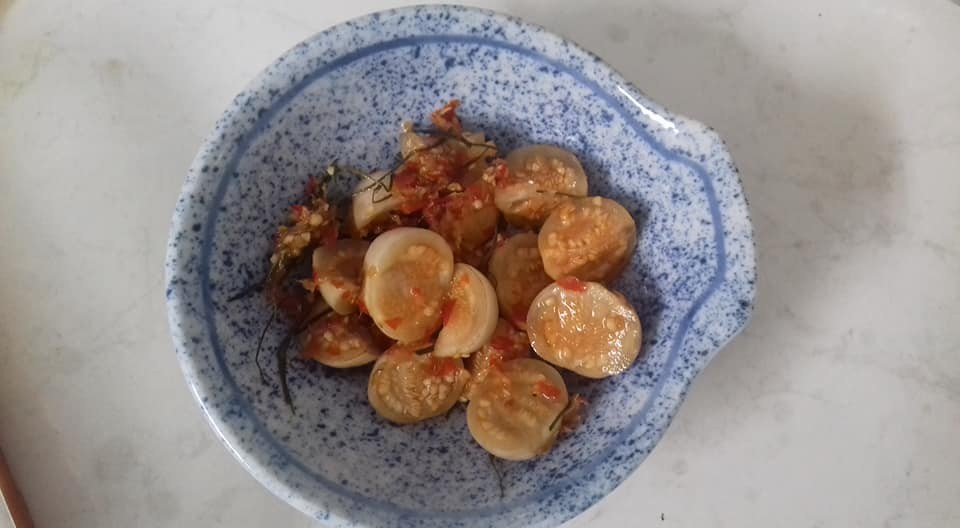 Món cà dầm tương của Nghệ An